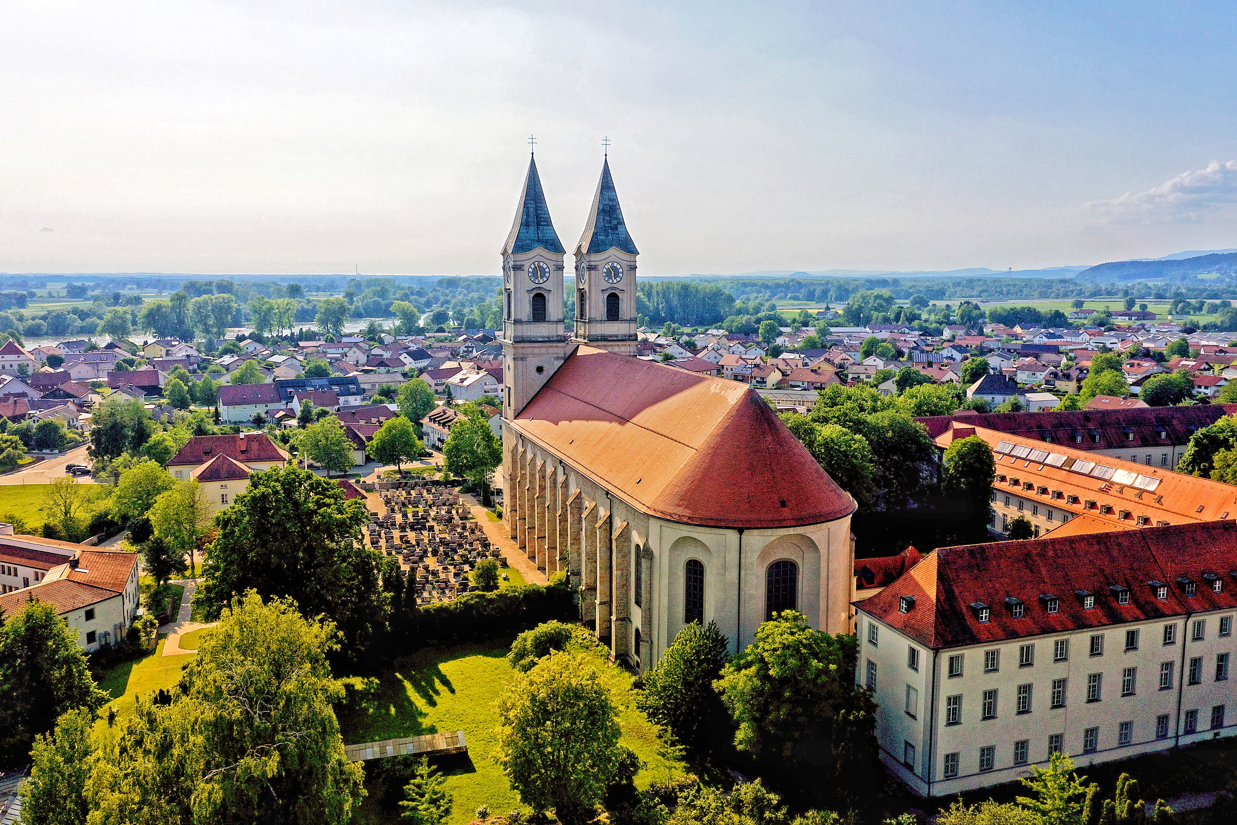 Kloster Niederaltaich in Niederalteich